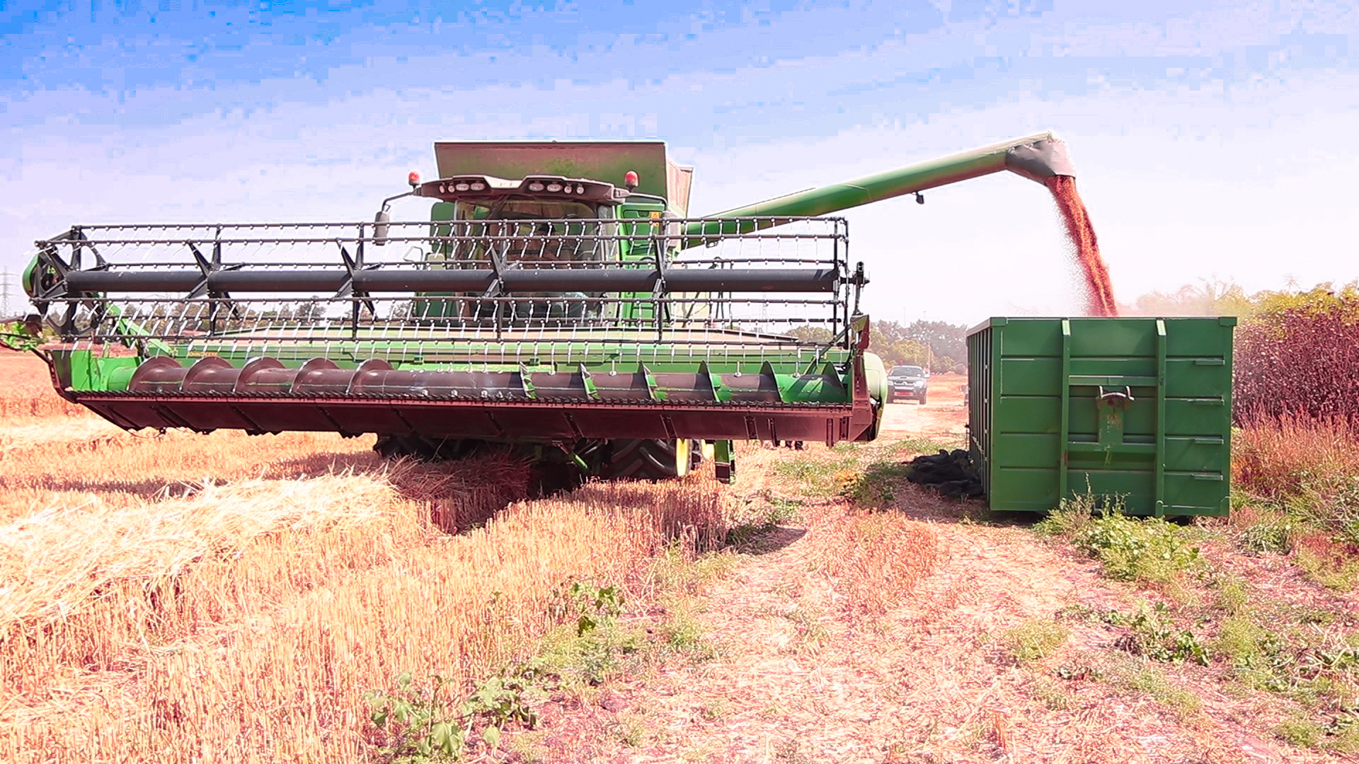 העברת גרעיני החיטה המופרדים מהקומביין אל מיכל האיסוף